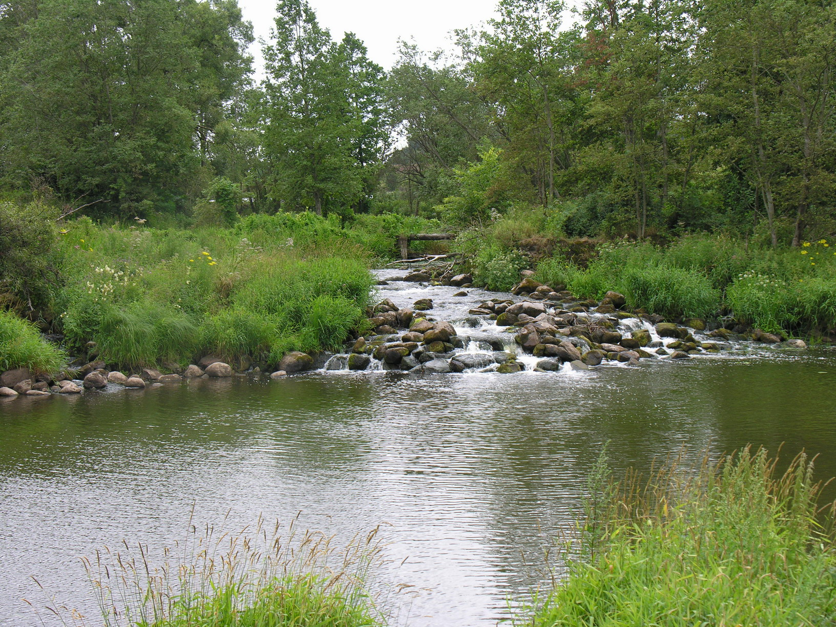 Varduva ties Grieže, Mažeikių raj. Foto: Algirdas, 2005 m. liepos mėn.